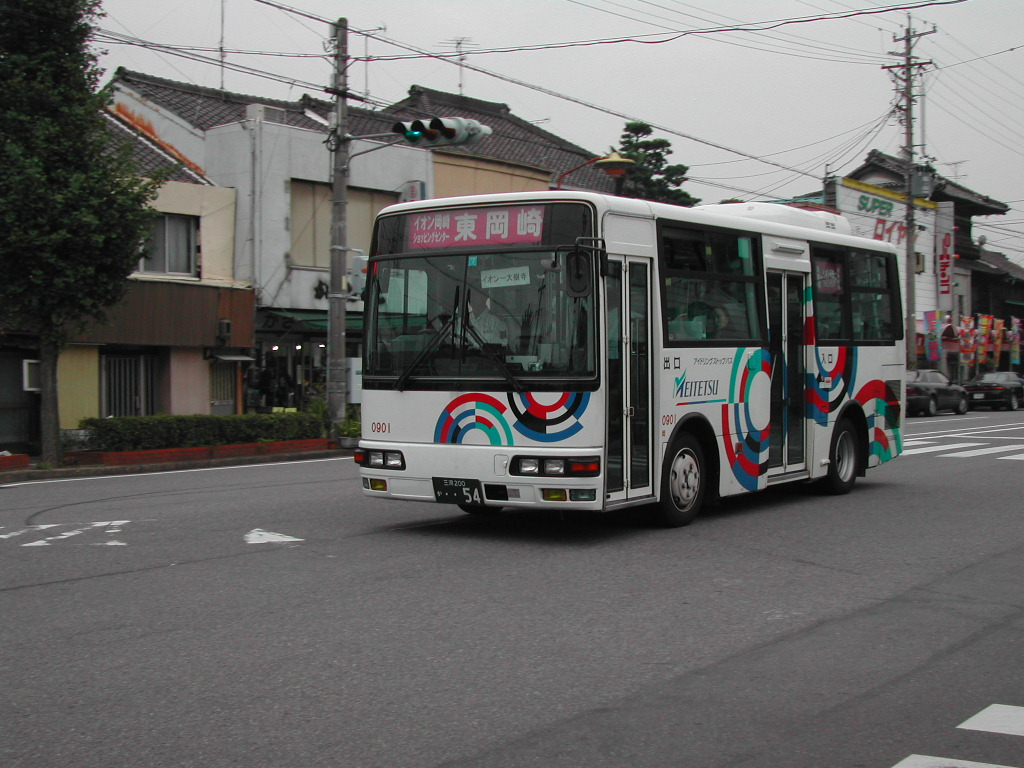 JR岡崎駅前にて 2002-9-22撮影